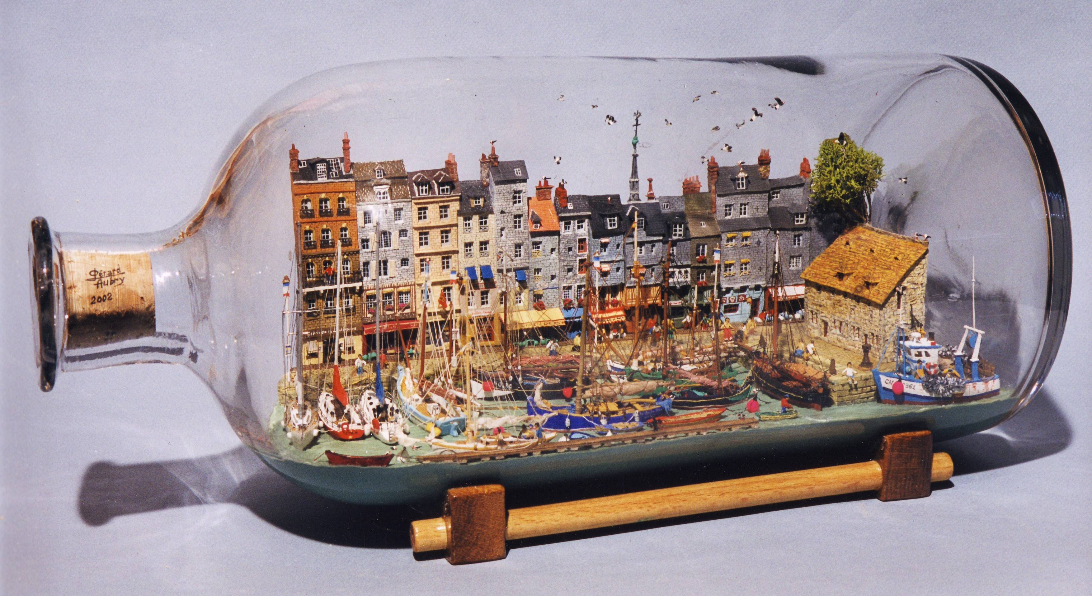 Le port de Honfleur : le vieux bassin, le quai Sainte-Catherine et la Lieutenance. Flacon ancien de laboratoire.